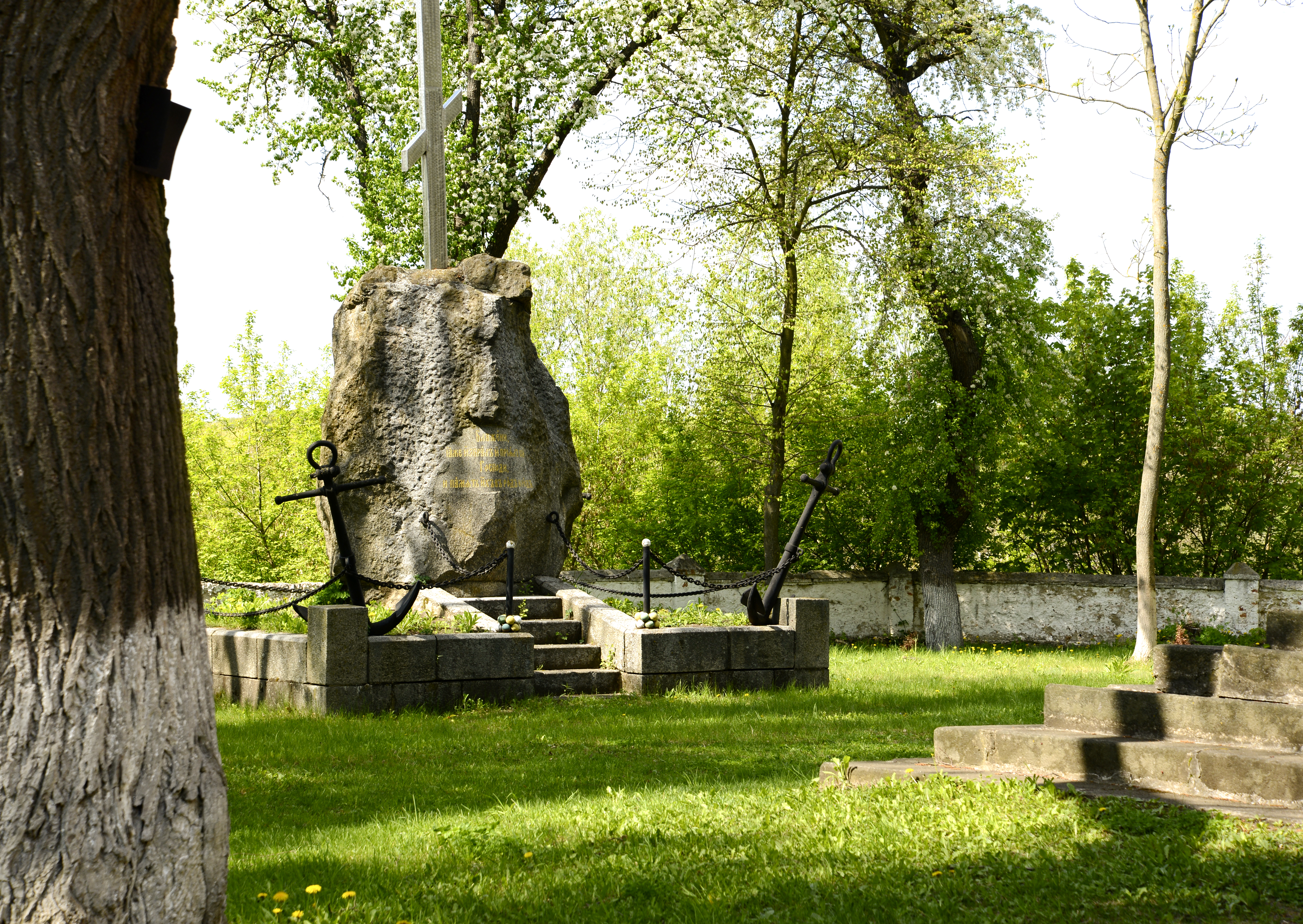 Пам’ятник морякам, які загинули в Цусімському бою, Круподеринці, вул. Нижня Гута, біля церкви